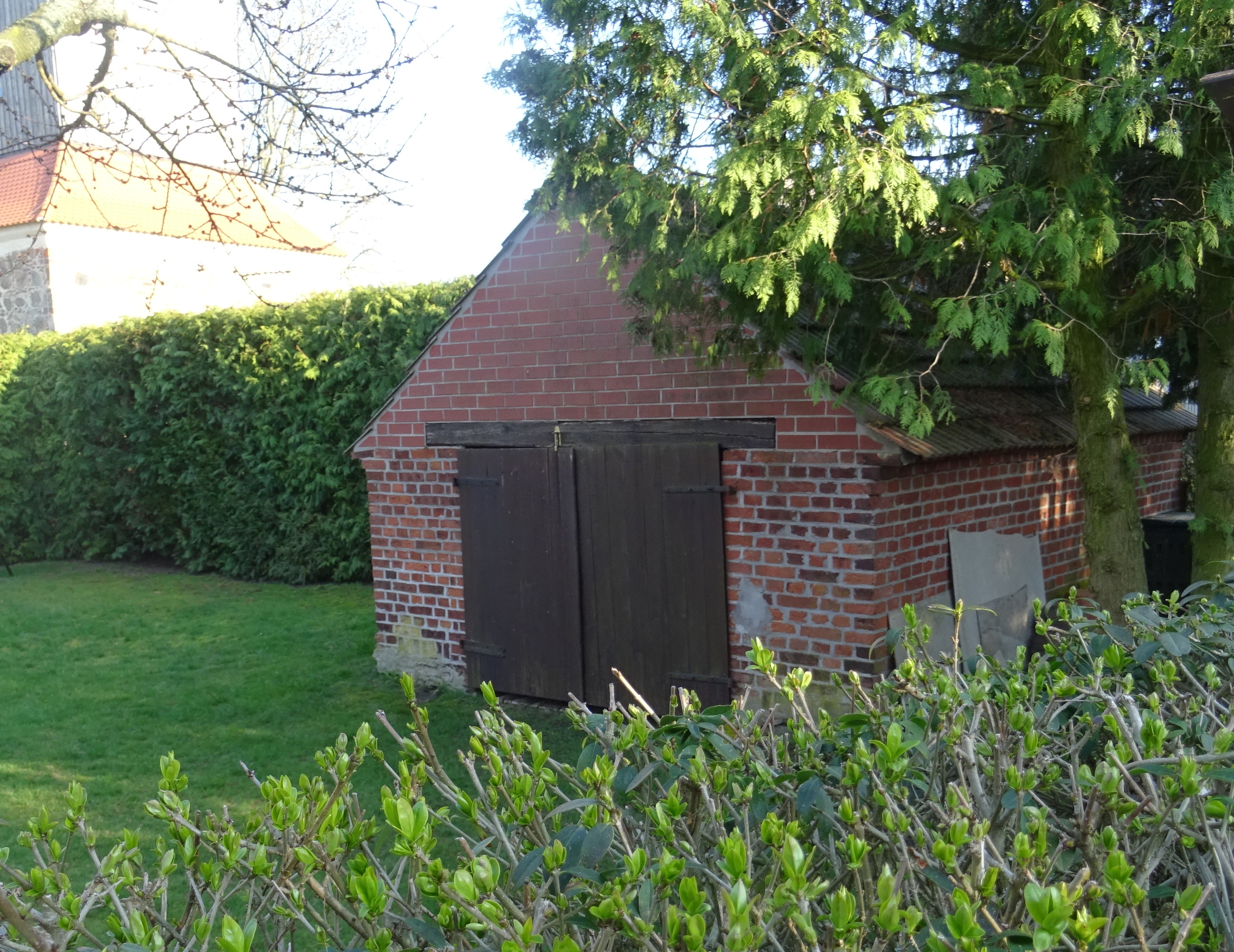 Riesdorf, Gemeinde Niederer Fläming, denkmalgeschütztes Backhaus, Dorfstr. 22